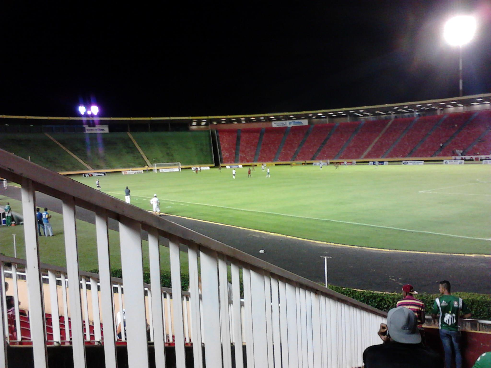 Estádio Parque do Sabiá na partida entre Uberlândia 1x1 Patrocinense, realizada em 2014 pelo Campeonato Mineiro do Módulo II.